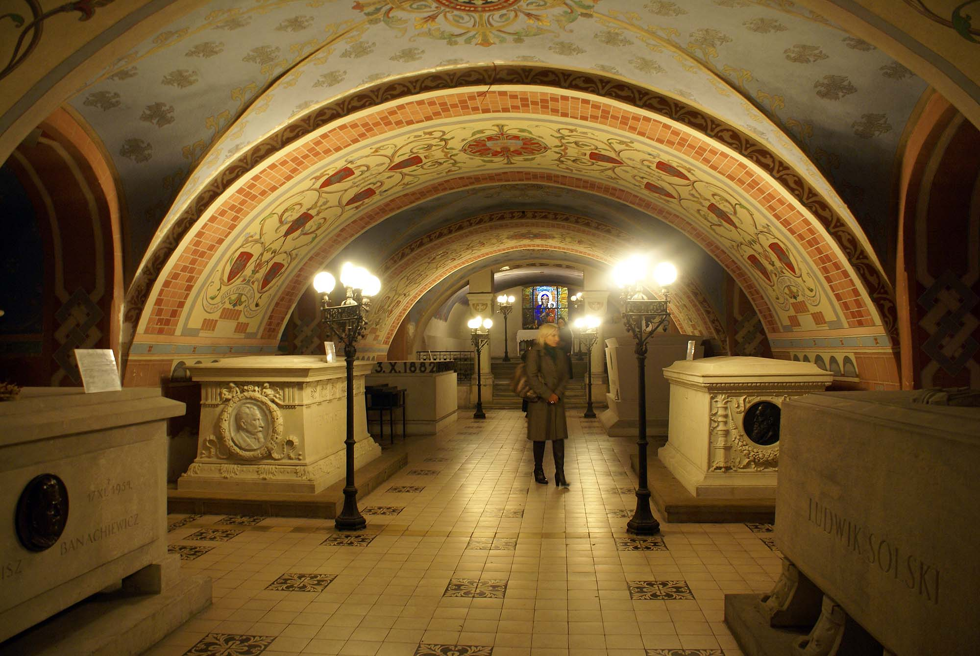 Kraków, zespół klasztorny paulinów (Na Skałce), XVII/XVIII